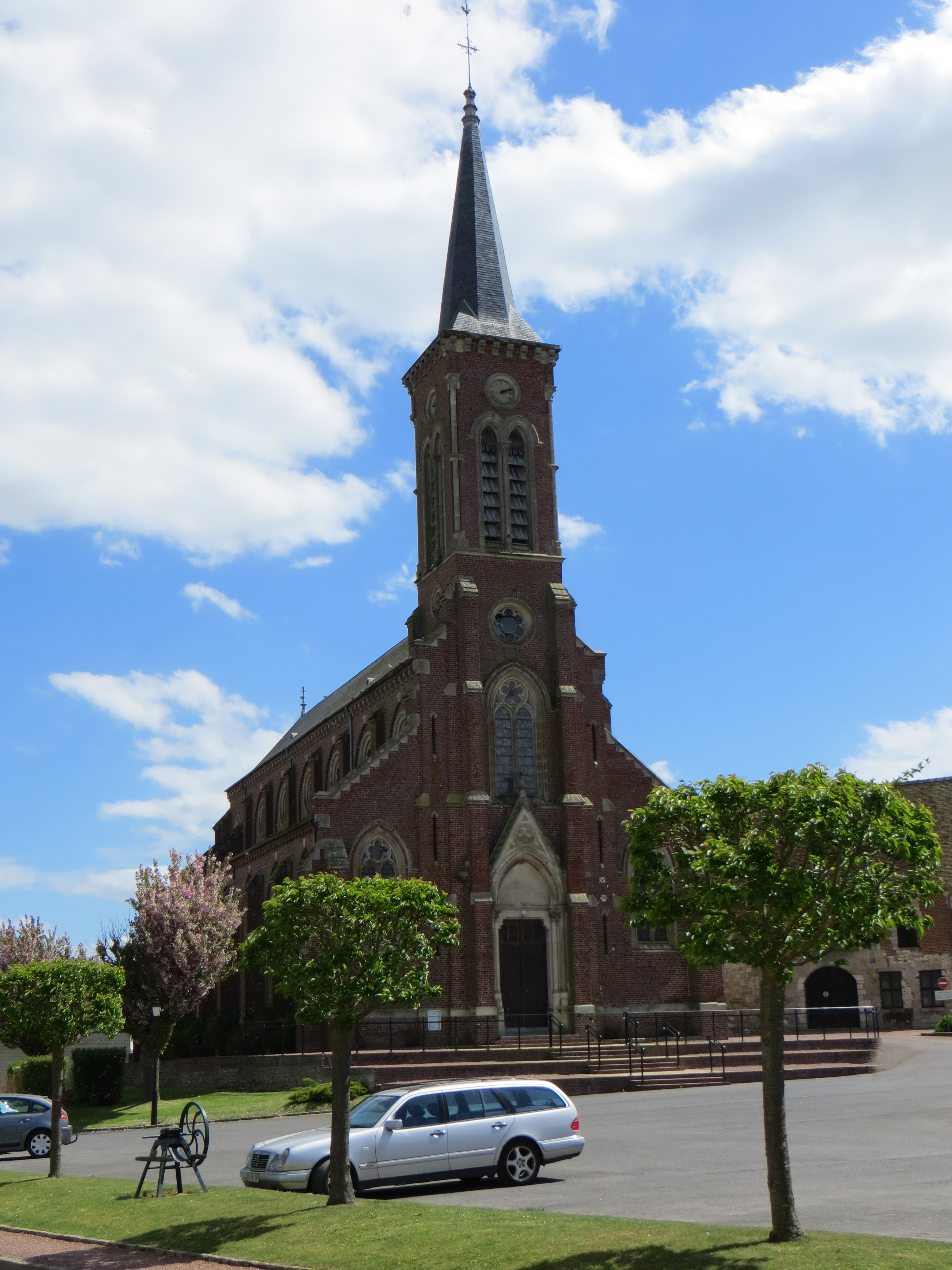 Vue générale de l'église